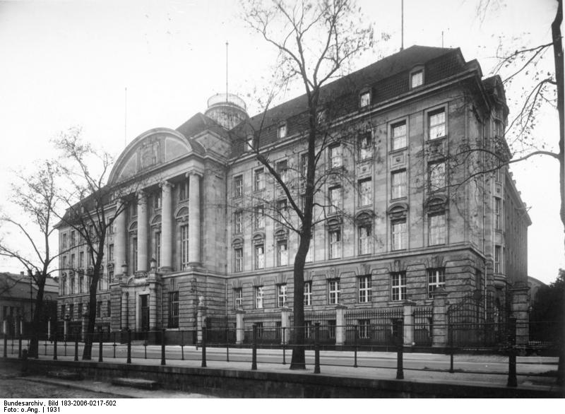 Scherl Bilderdienst: [Berlin 1931] Reichsbahn-Zentralamt, Hallesches Ufer 35 - 36, offenbar kriegszerstört 34049 - 31